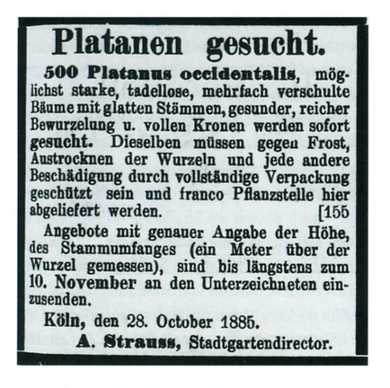 Suchanzeige des Kölner Gartendirektors Anton Strauß im Jahr 1885